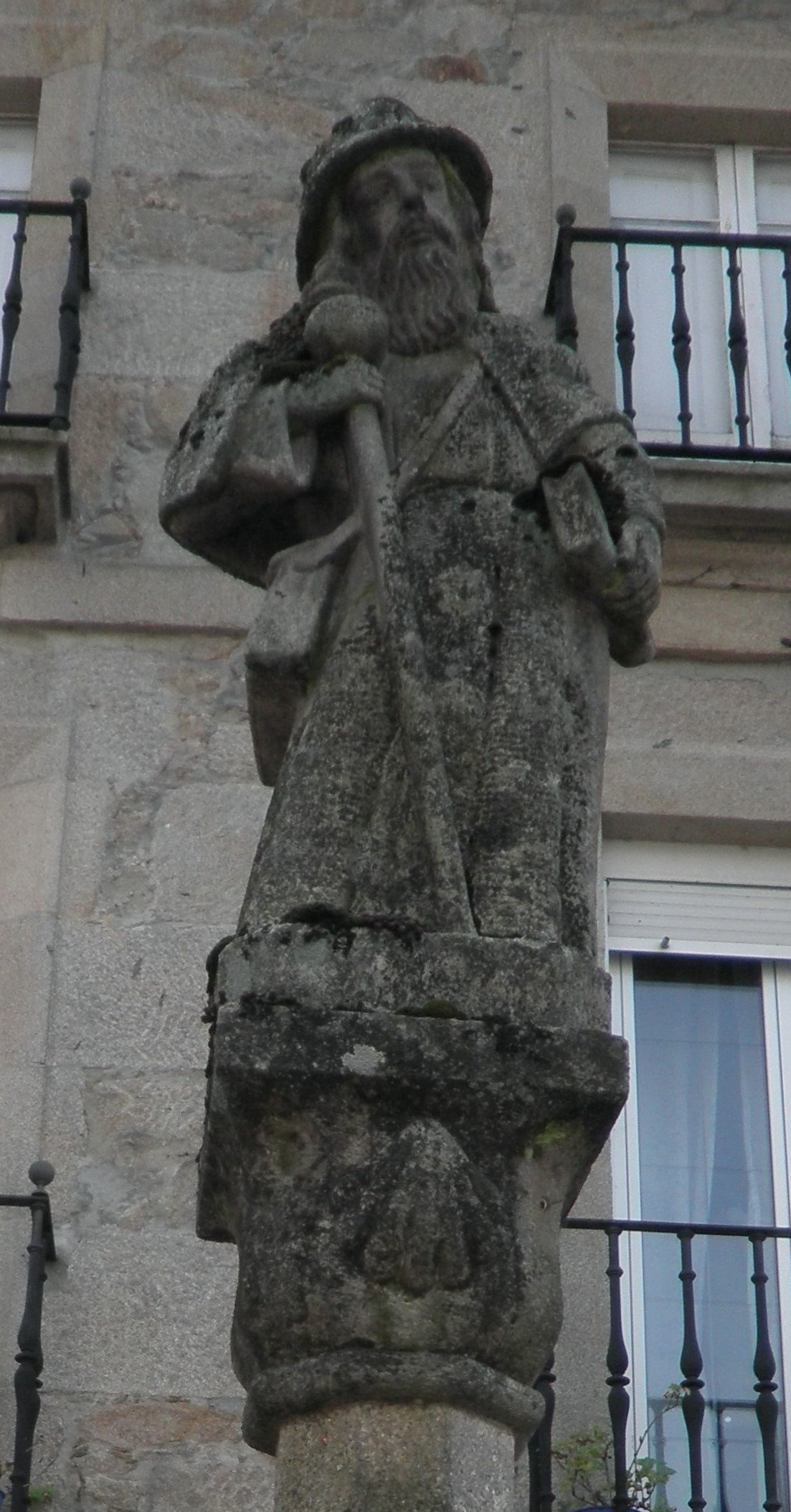 Cruceiro Xacobeo en Pontecesures, o Apóstolo Santiago representado como peregrino. Creado por un canteiro de Calo (Teo) coñecido como "O Pequeno", ano 1965